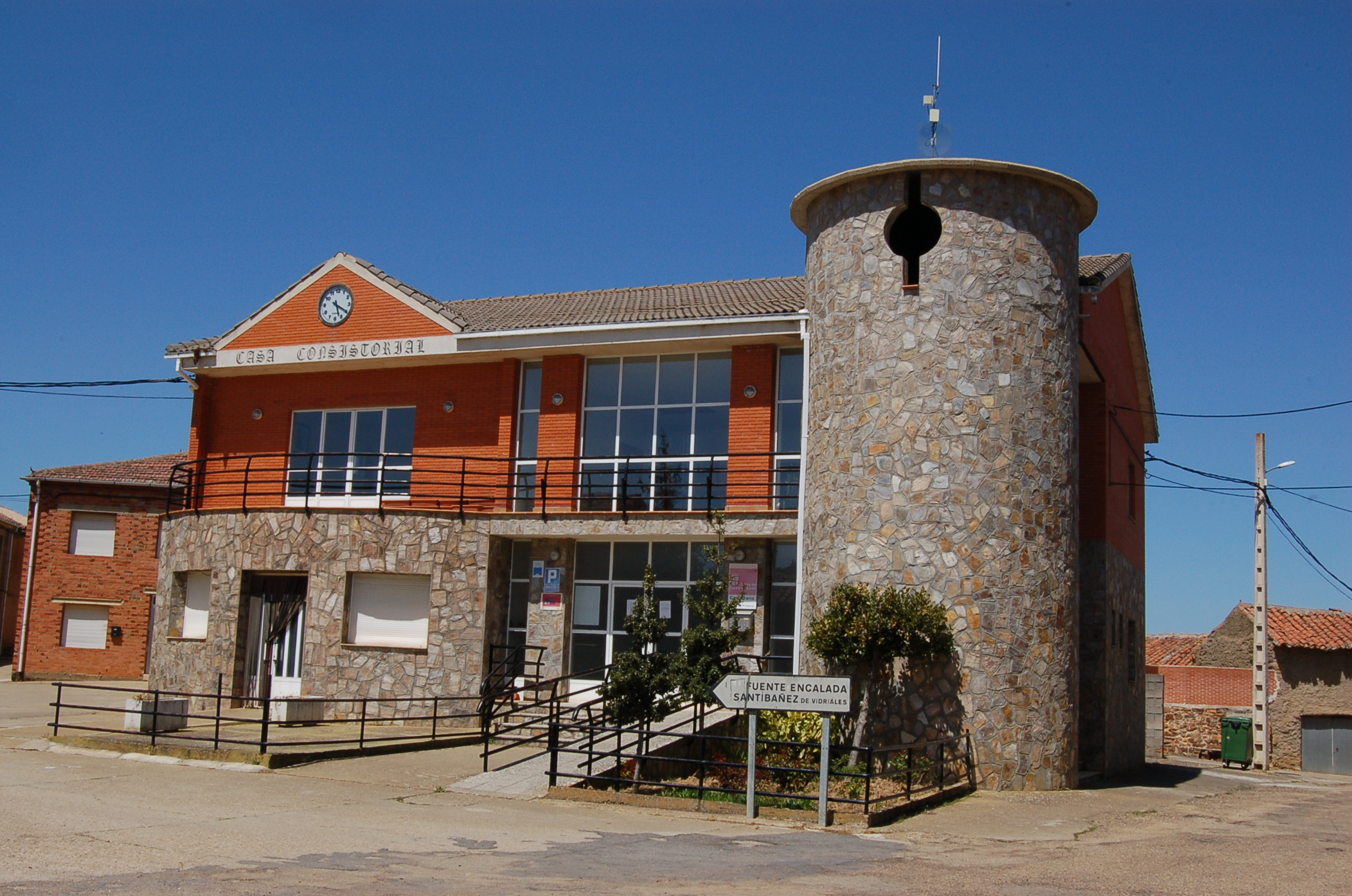 Casa consistorial de Alcubilla de Nogales